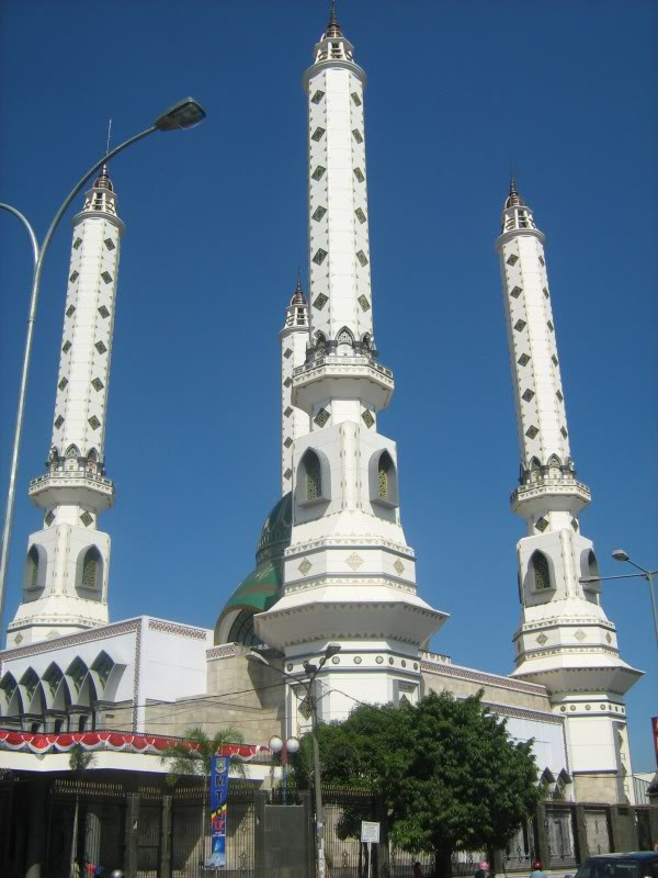 Foto Masjid Agung Nurul Ikhlas Cilegon